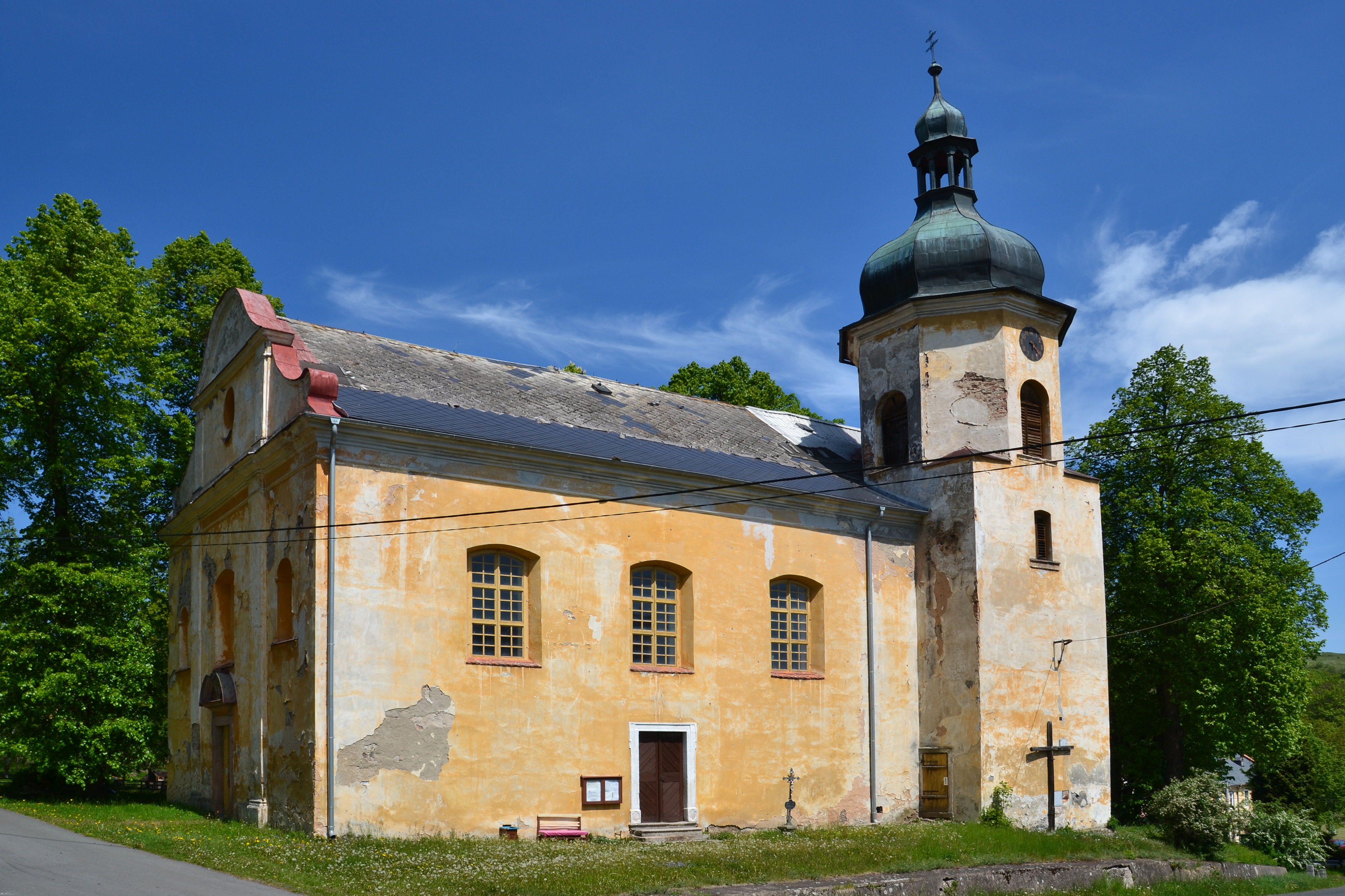 Kostel sv. Vavřince (Luka), Luka